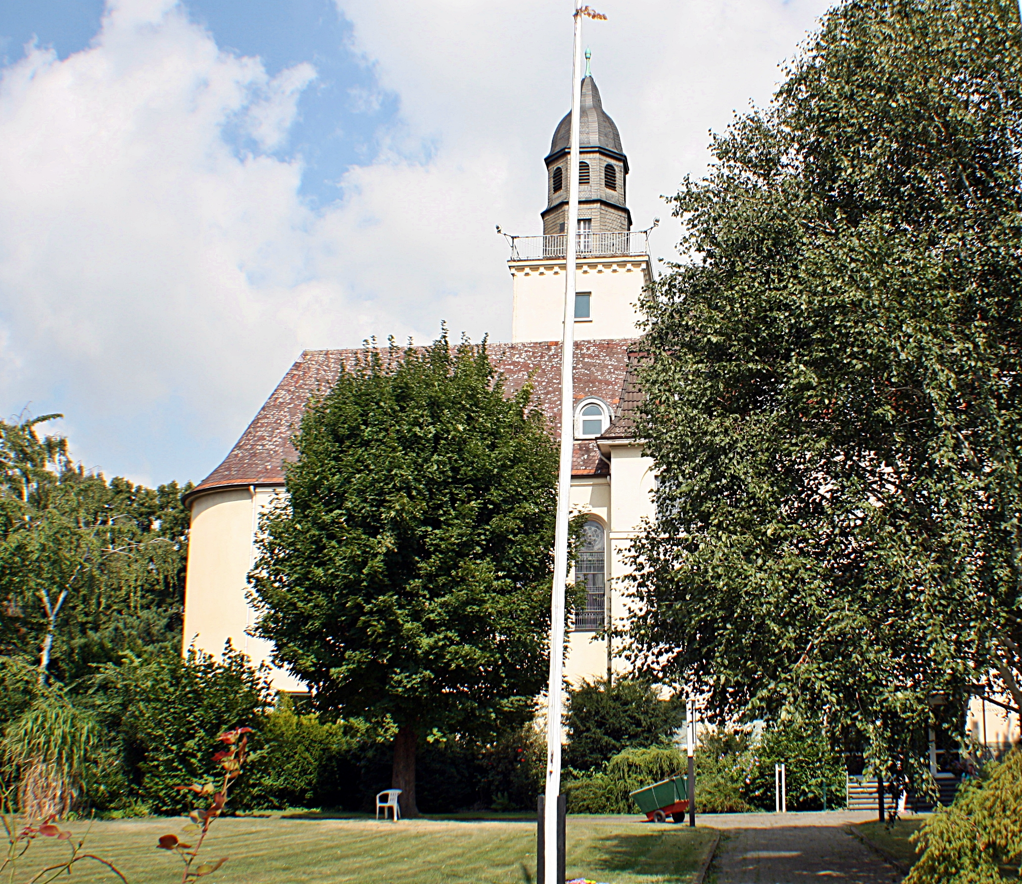 Werl, Ehemaliges Erzbischöfliches Konvikt